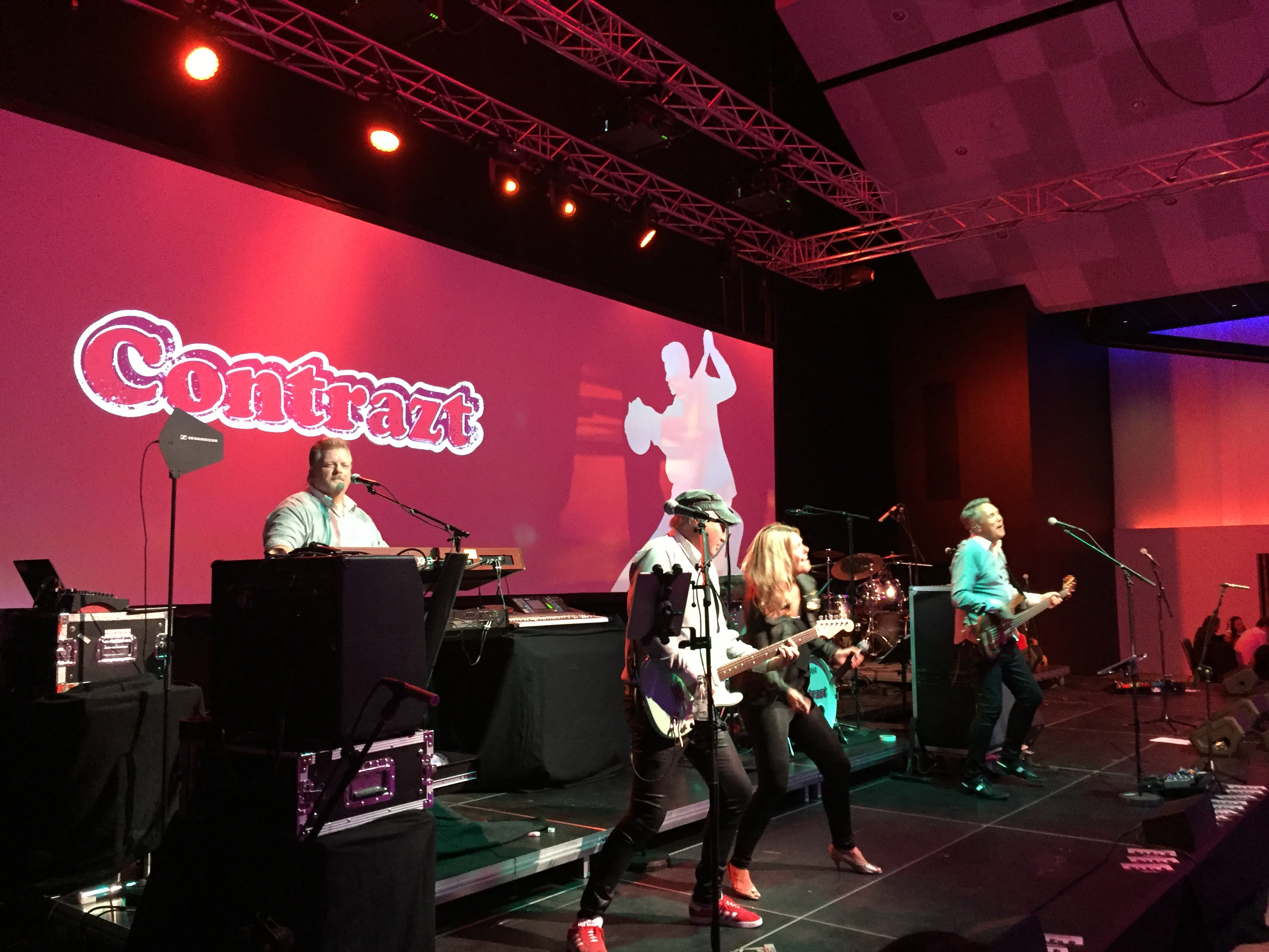 Dansebandet Contrazt spiller til dans på Panorama Hotell & Resort